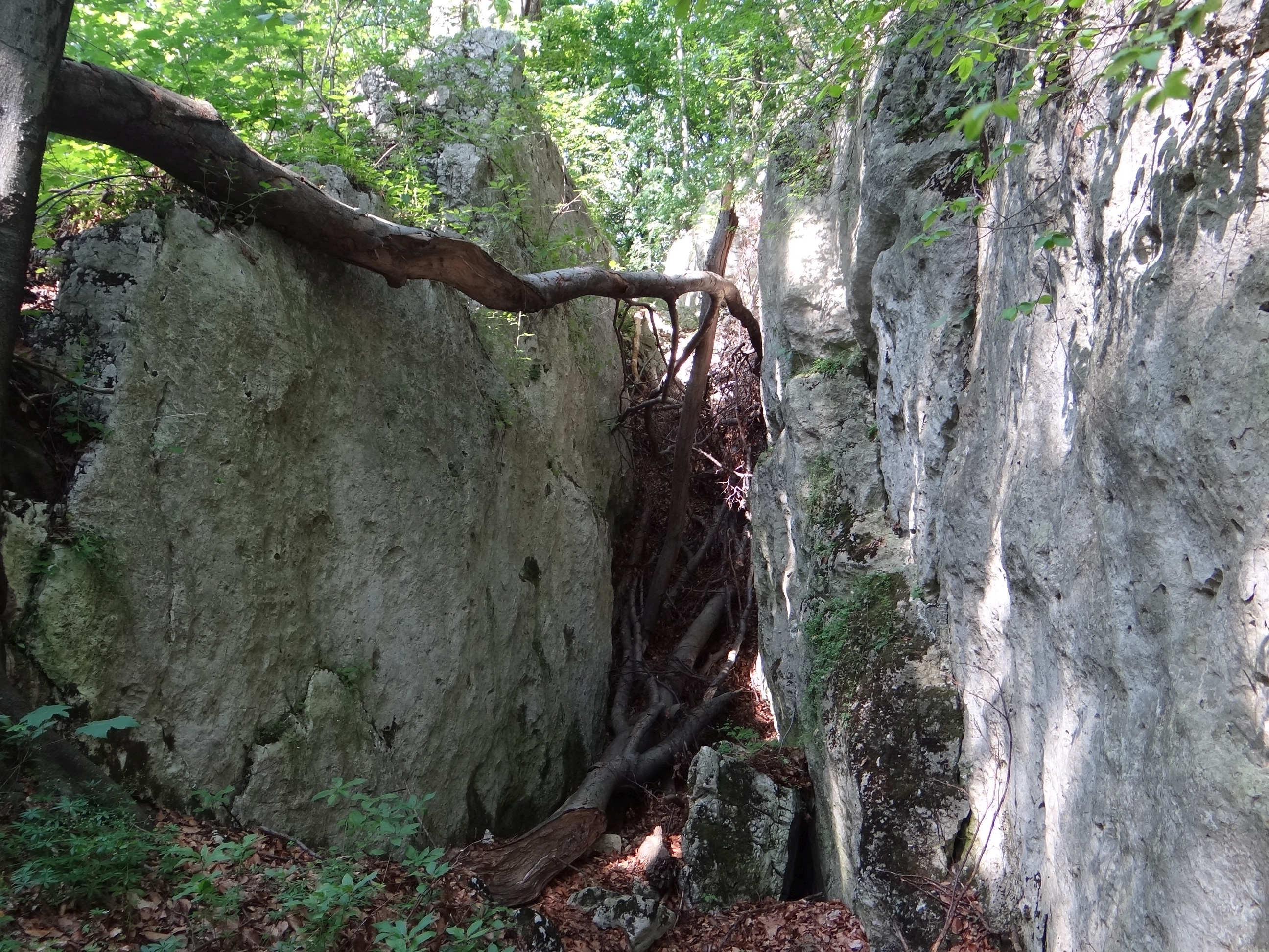 Rezerwat przyrody Pazurek